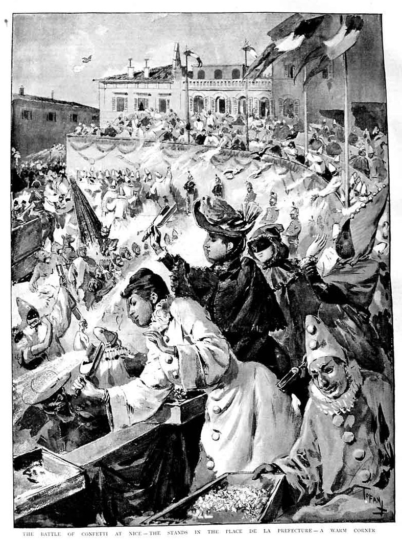 Bataille de confetti au Carnaval de Nice en 1891, place de la Préfecture. Taille de l'image avec les marges : 39,5 cm x 28 cm)